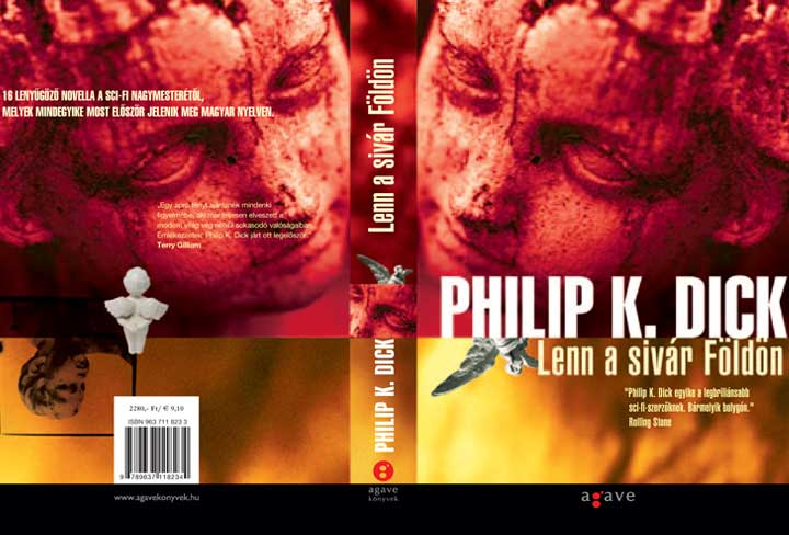 Philip K. Dick Lenn a sivár Földön c. novelláskötetének borítója